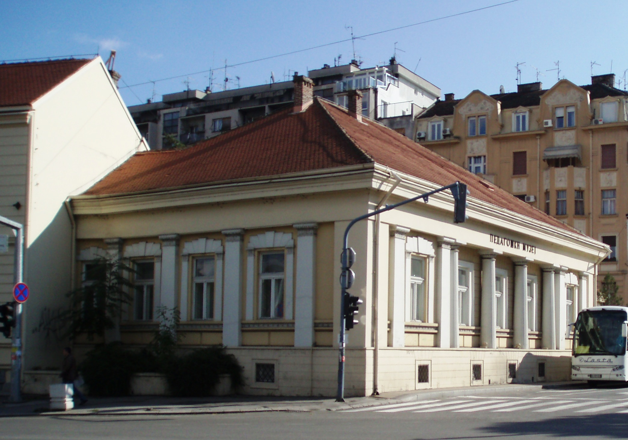 Душан Ј.Басић: Фотографија Педагошког музеја у Београду